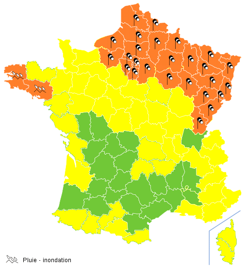 Carte vigilance meteo france 28 février 2010 12h24